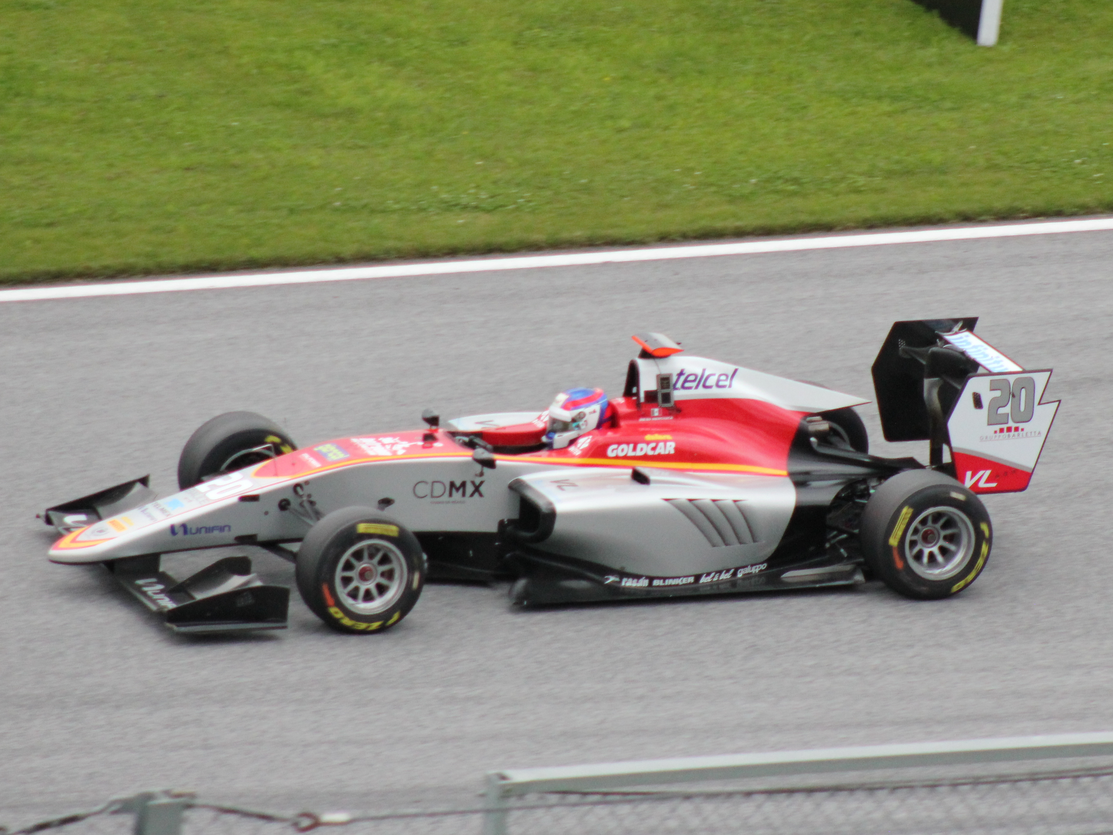 20 Diego Menchaca beim Rennwochenende in Österreich 2018